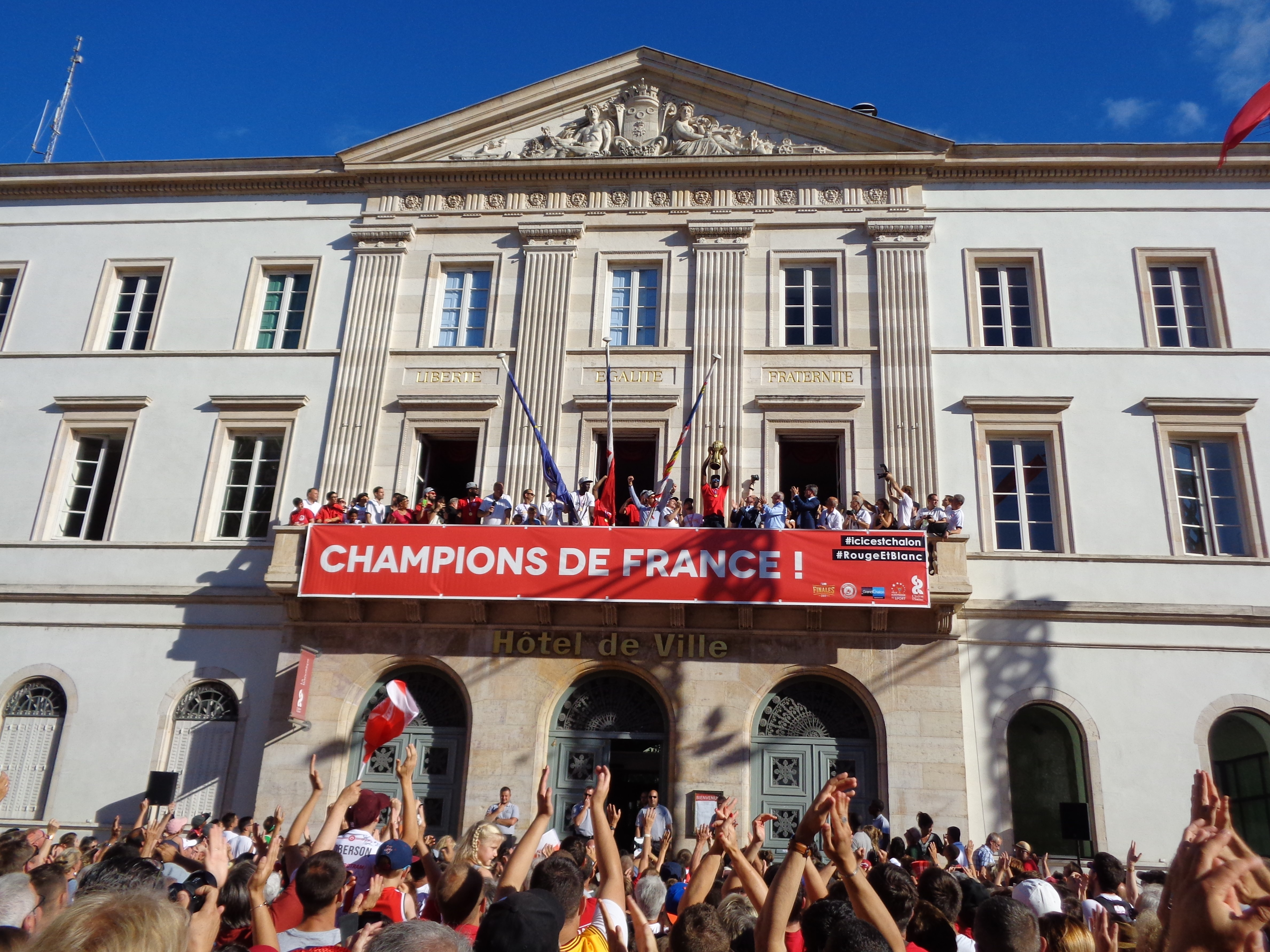 Titre de Champion de France de basket-ball 2017 Elan Chalon : l'équipe, le staff... avec le trophée de Champion de France sur le balcon de l'hotel de ville de Chalon-sur-Saône.